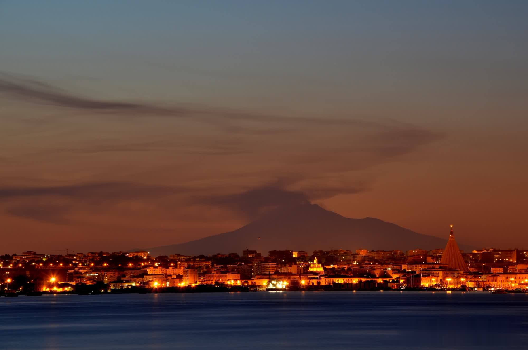 Etna vista da Siracusa